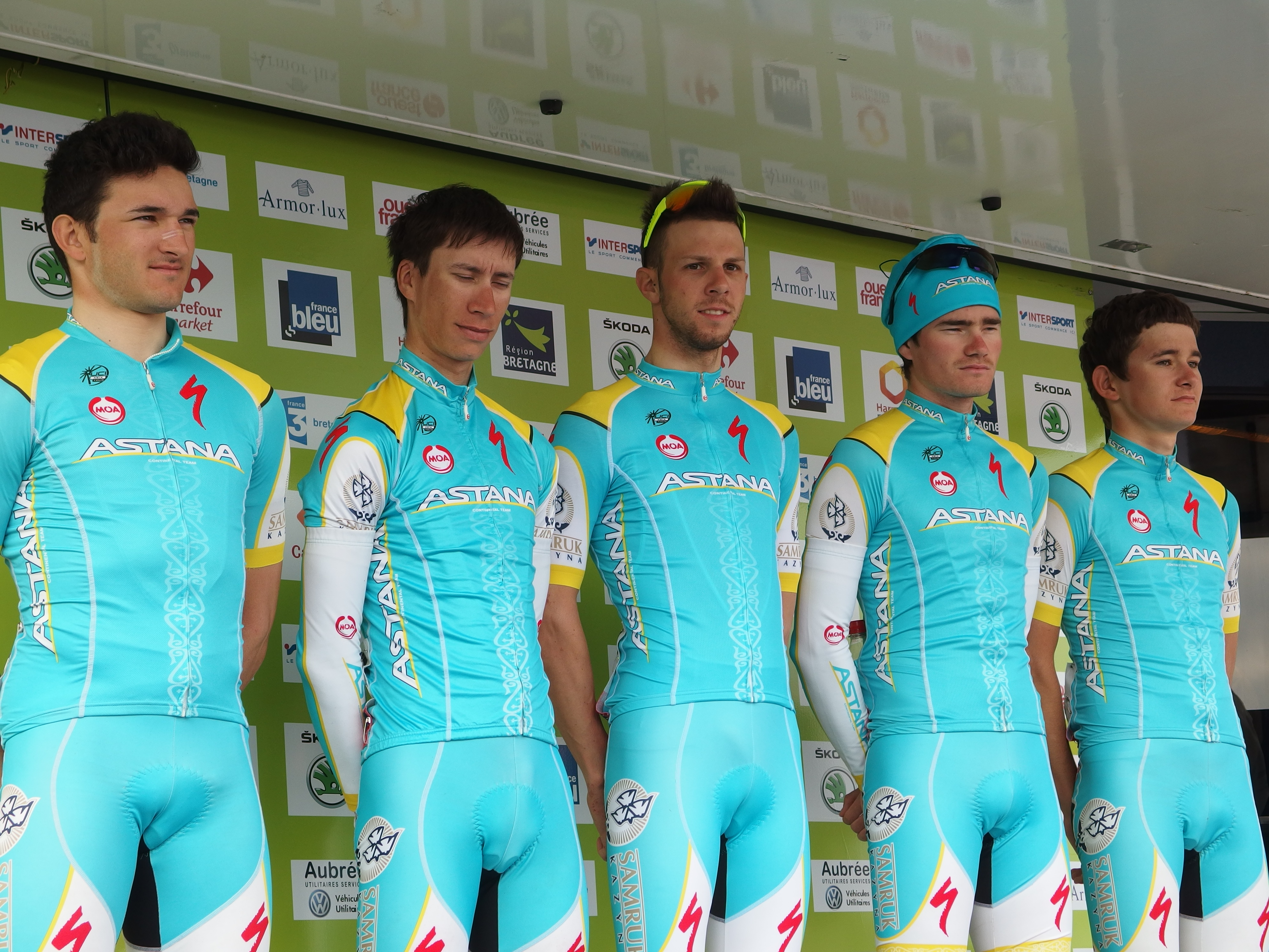 Tour de Bretagne 2014 - Présentation des équipes au départ de la sixième étape à Radenac - Équipe Astana Continental Depicted people: Marco Benfatto, Pavel Gatskiy, Michele Scartezzini, Vadim Galeyev and Sergey Shemyakin